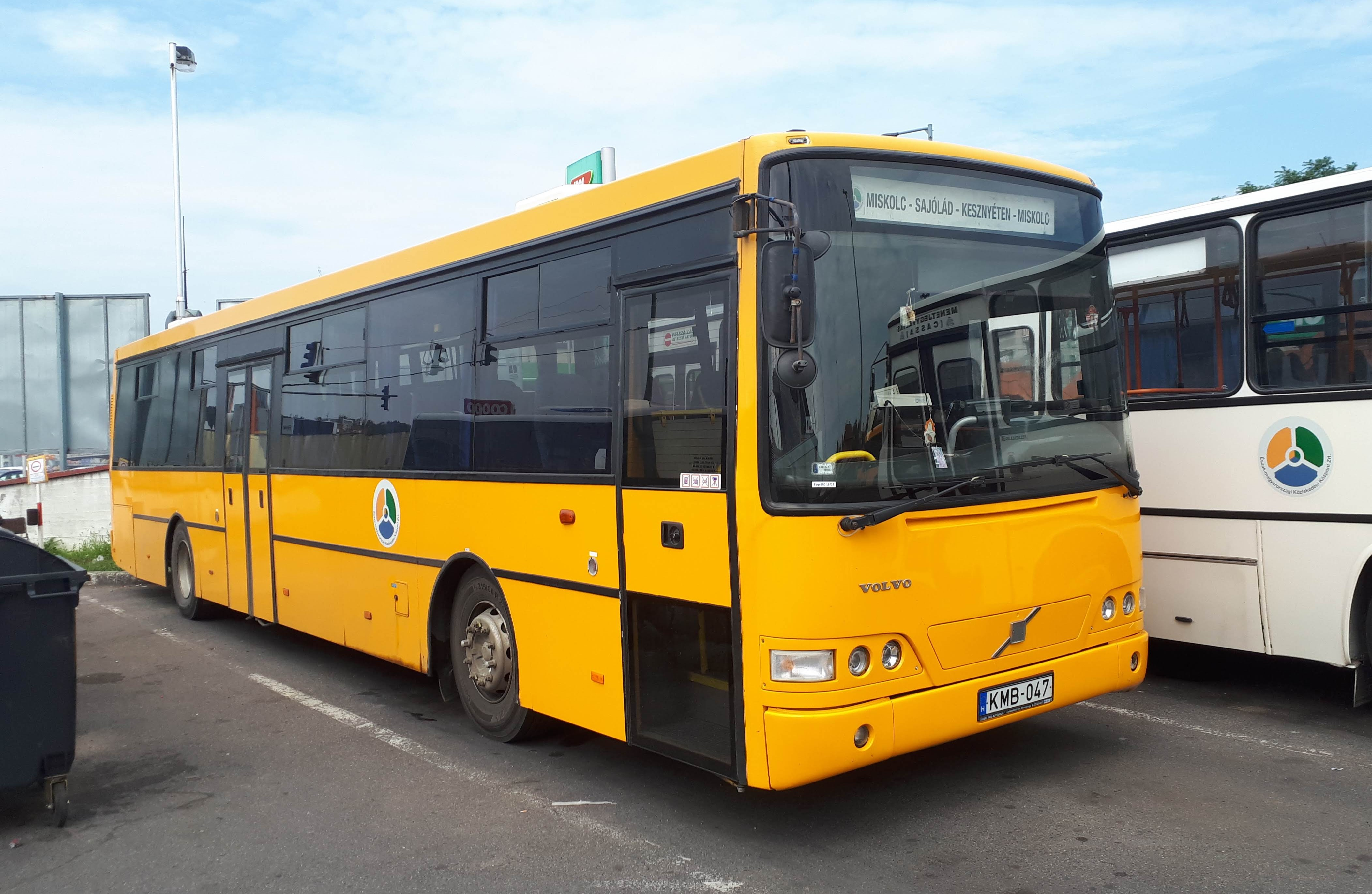 Az ÉMKK KMB-047 rendszámú Volvo Alfa Regio típusú busza Miskolcon, a 3733-as helyközi járaton.